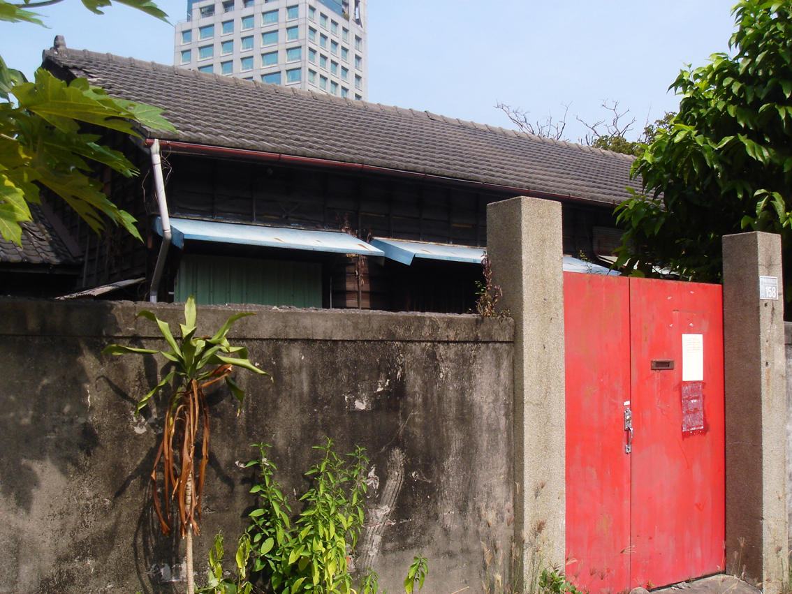 林之助畫室